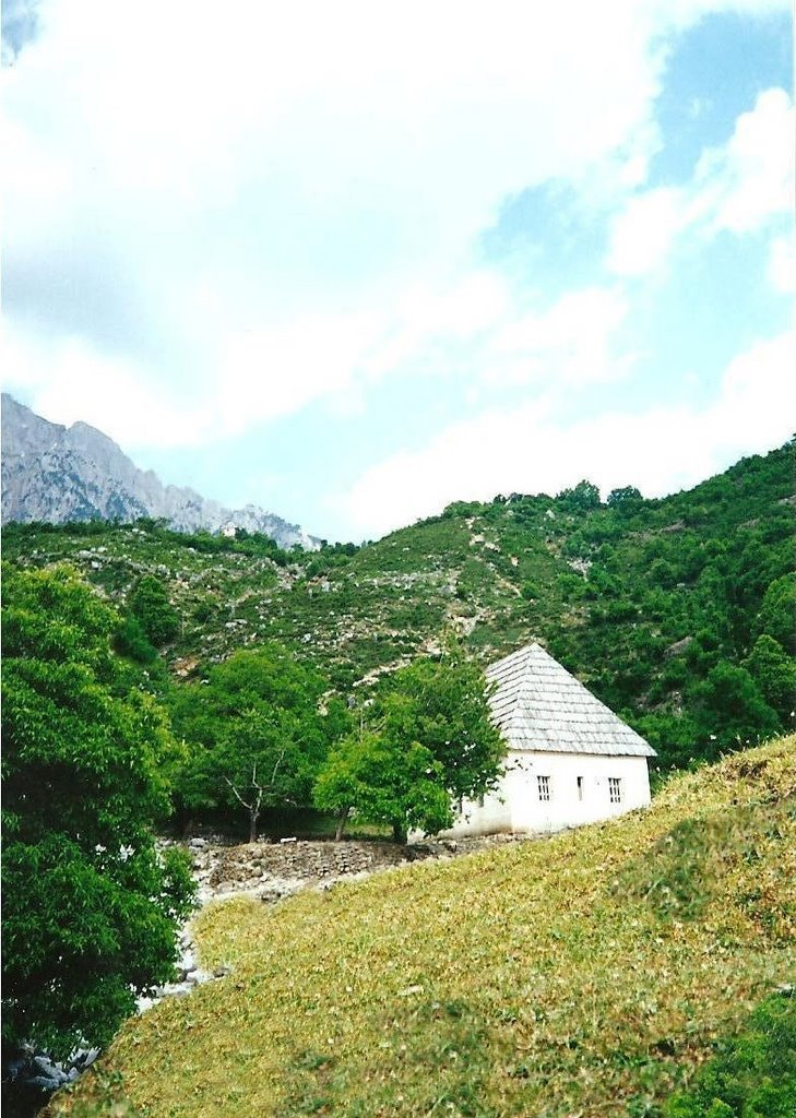 Shkolla 9-Vjeçare Abat